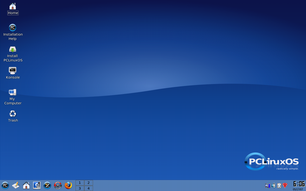 Captura de la distribución Linux llamada PCLinuxOS, utilizando el entorno KDE